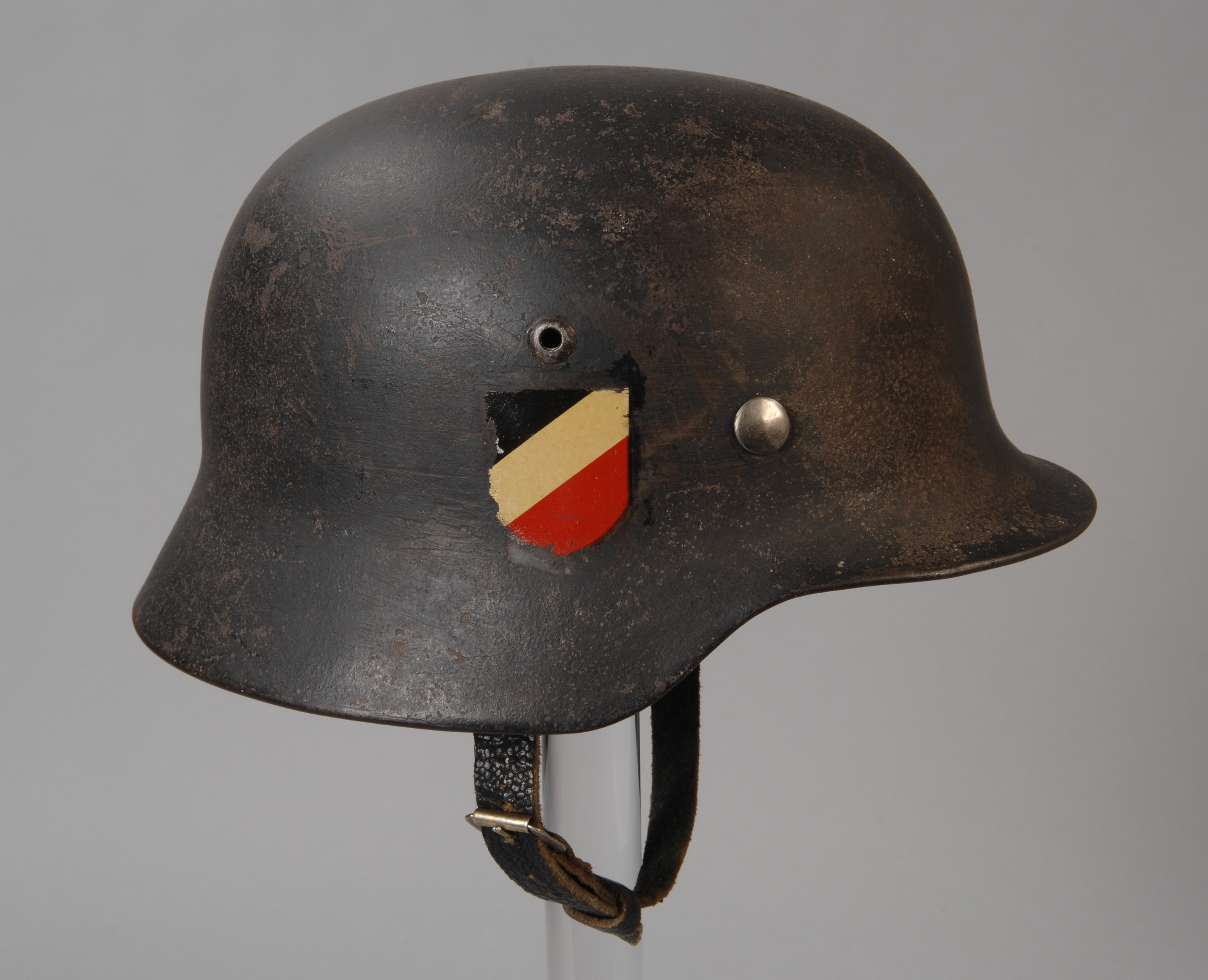 Duitse militaire Stahlhelm M.35, grijsgroen met rijkswapen, leren binnenhelm en kinriem met gesp